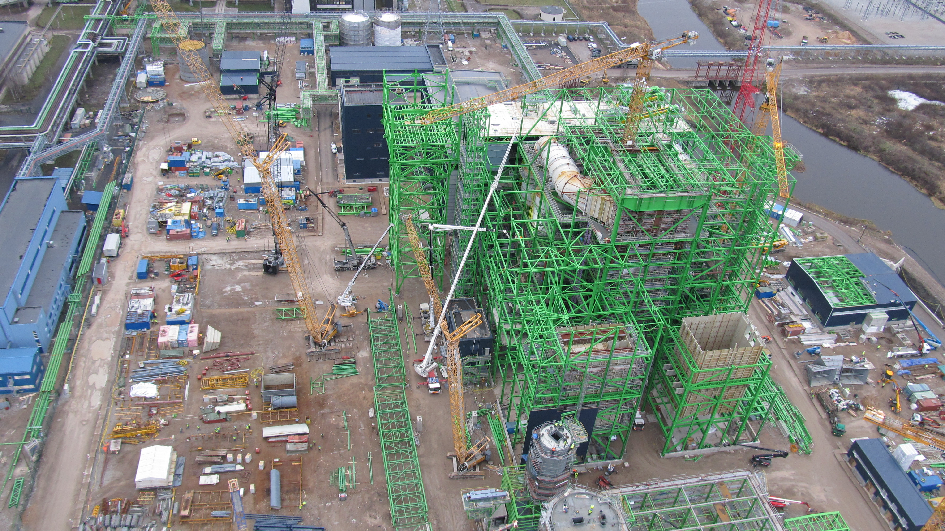 Строительство новой электростанции, 2013г.